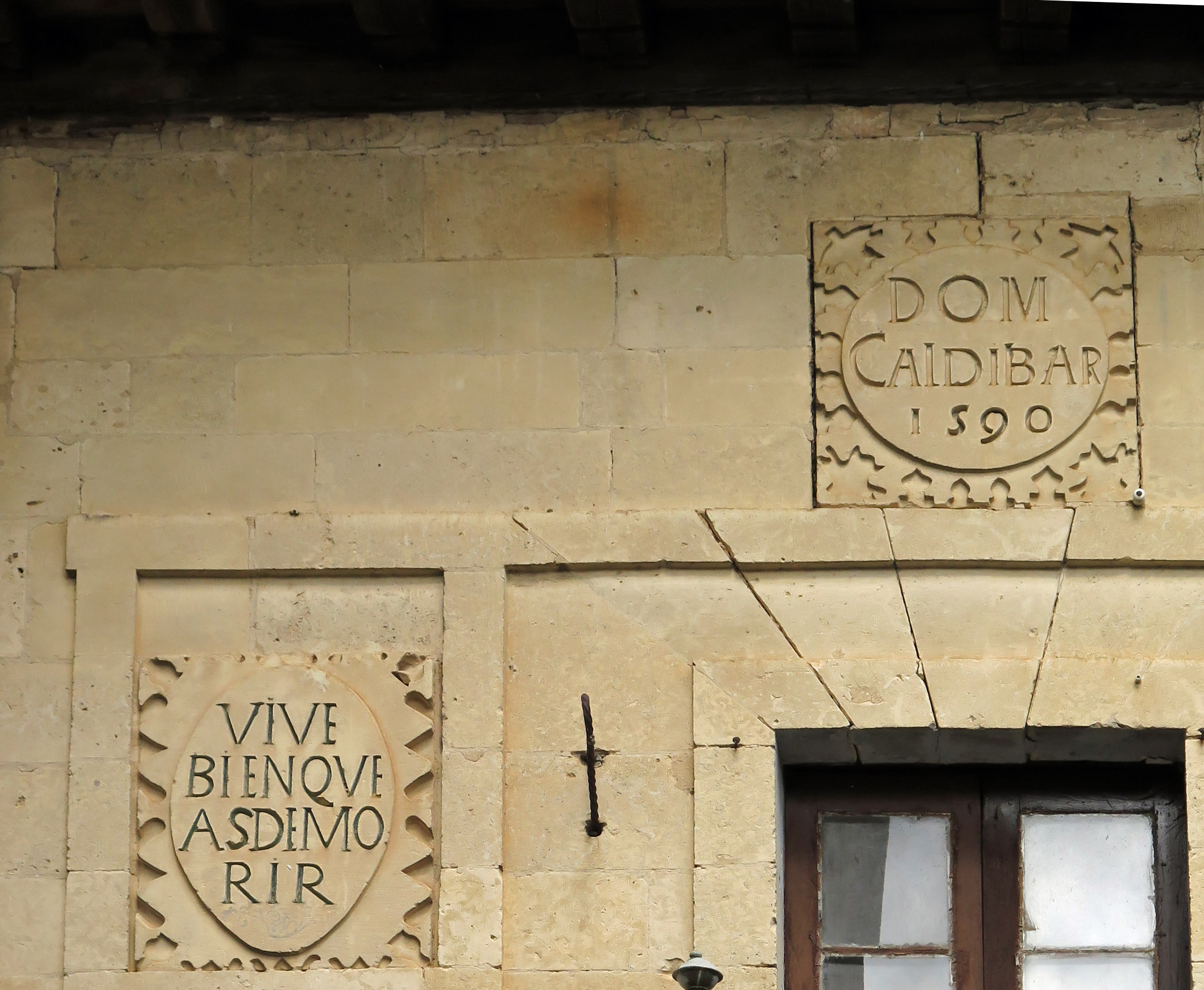 Detalle del palacio de los Zaldivar en Valpuesta (Berberana, provincia de Burgos), en los valles de San Zadornil y Valdegovía